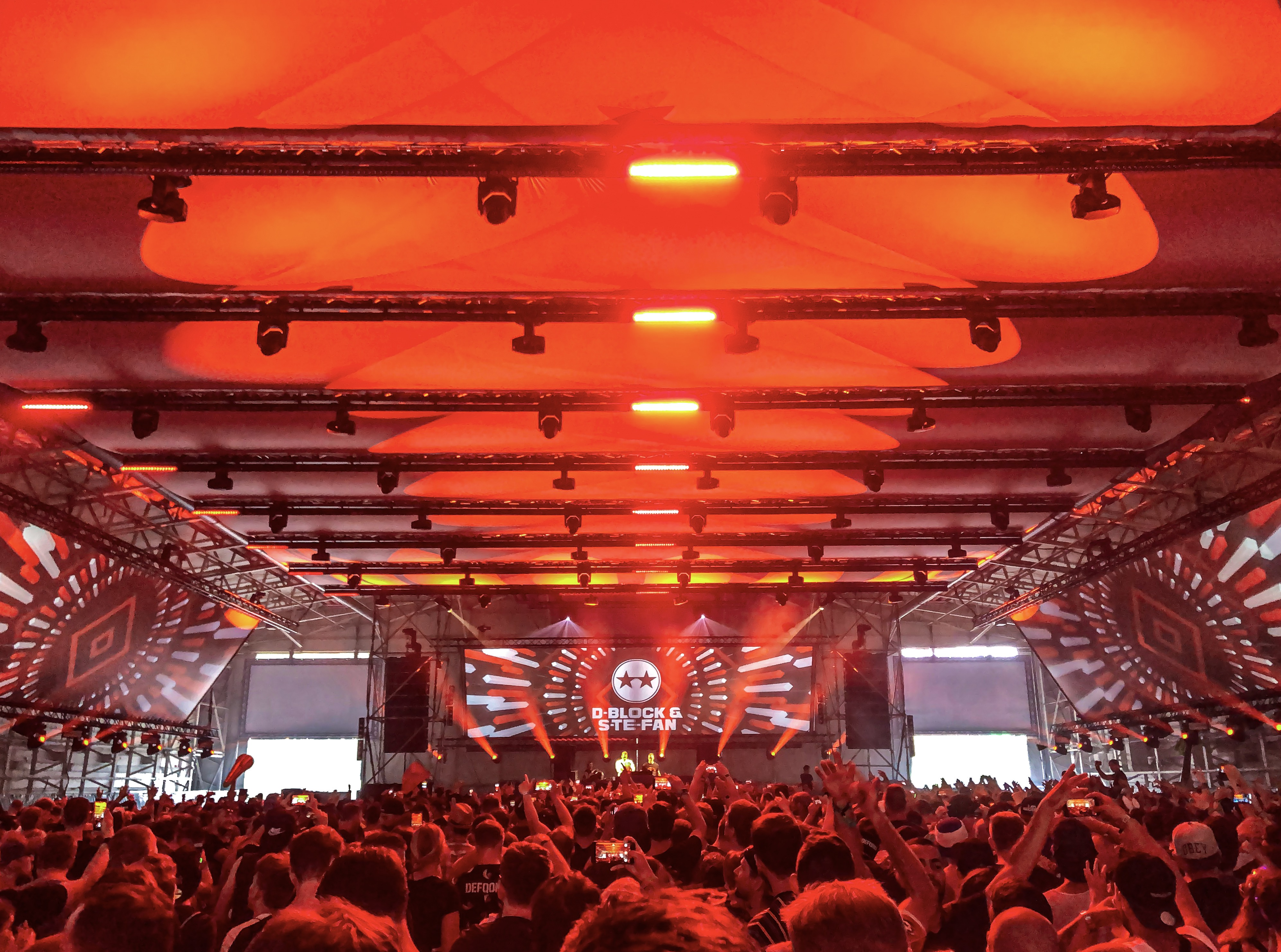 Cloud Factory Parookaville 2019 3